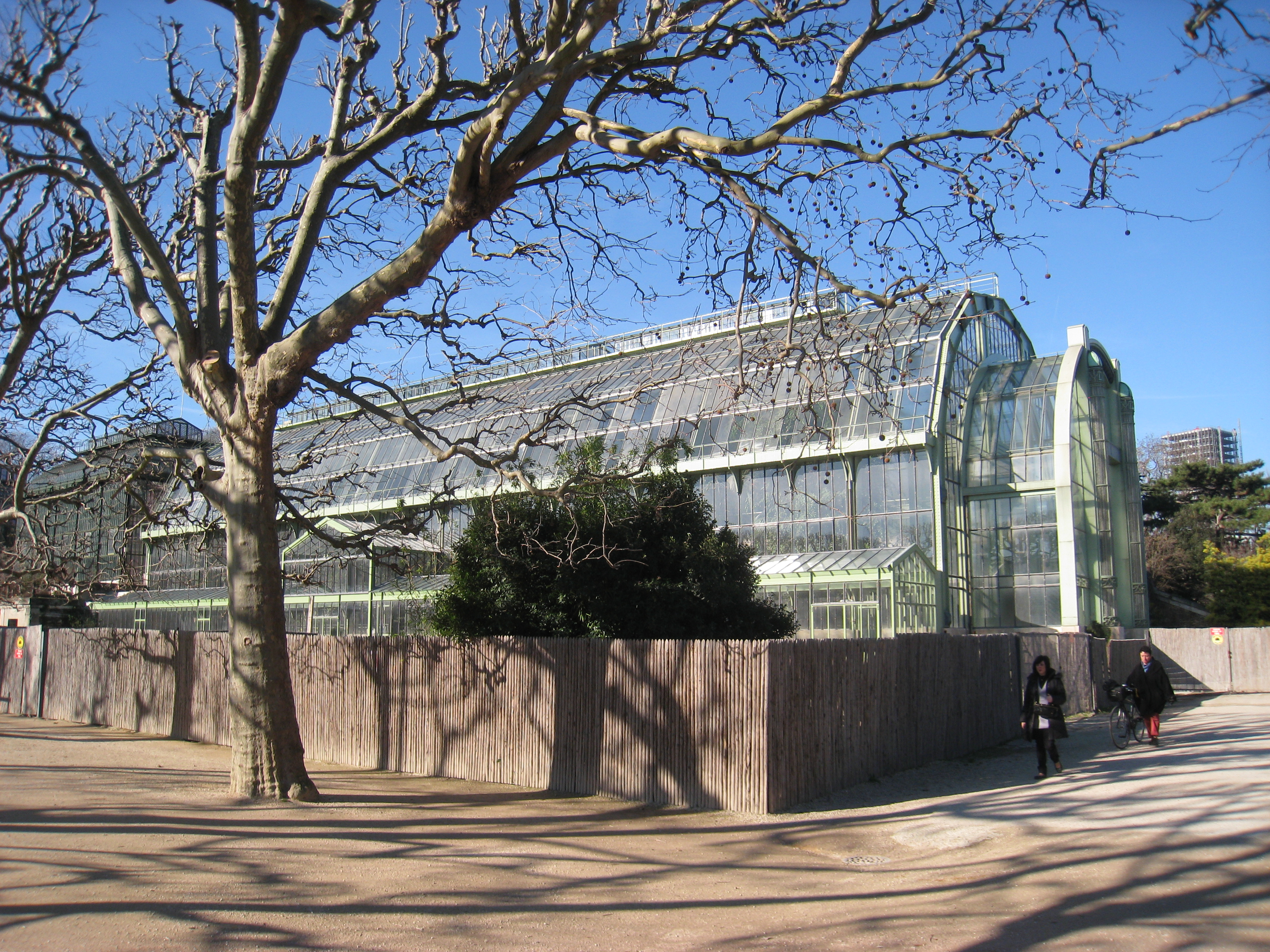 Jardin des Plantes de Paris, Paris, France - glass house.